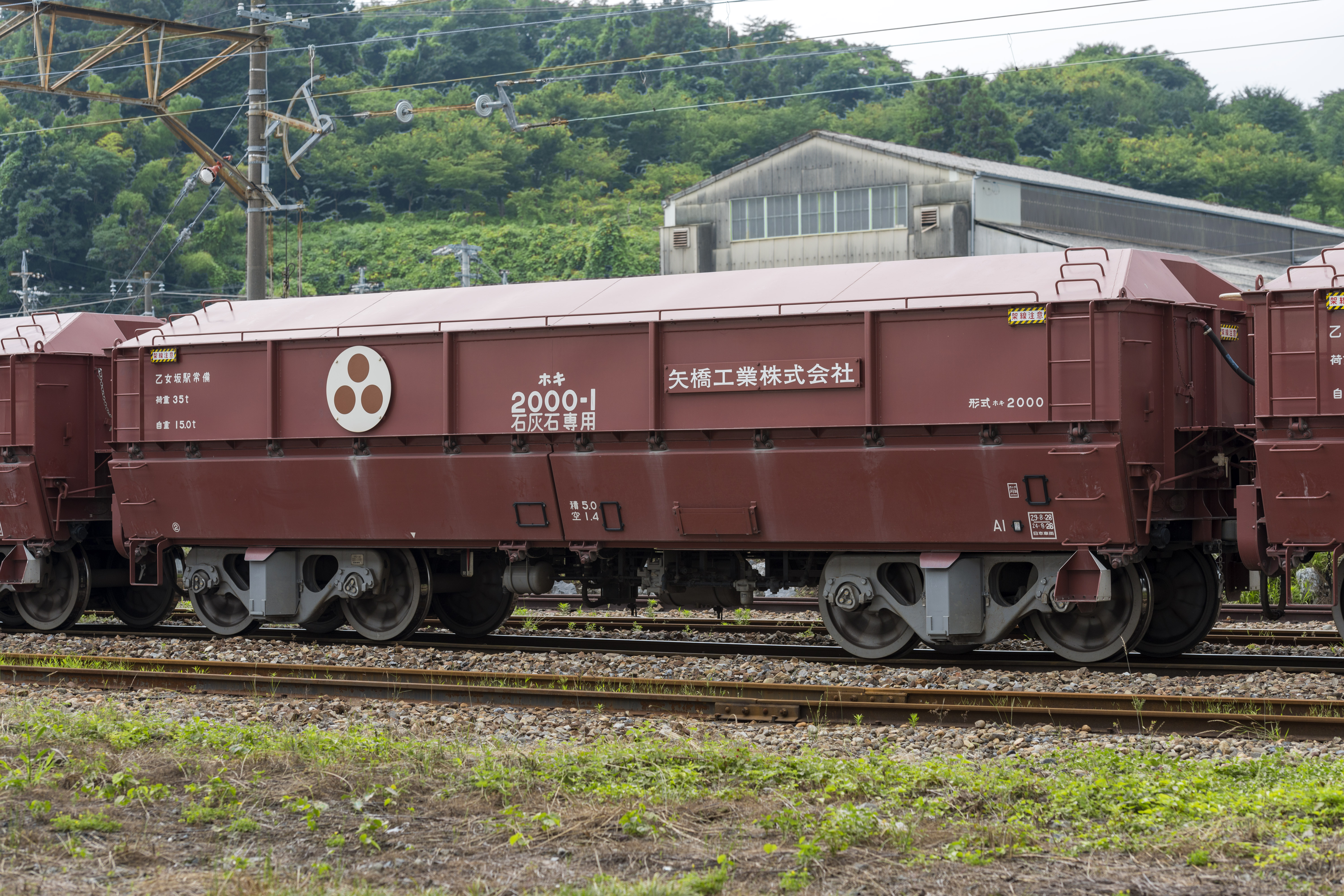 JR貨物ホキ2000形貨車ホキ2000-1